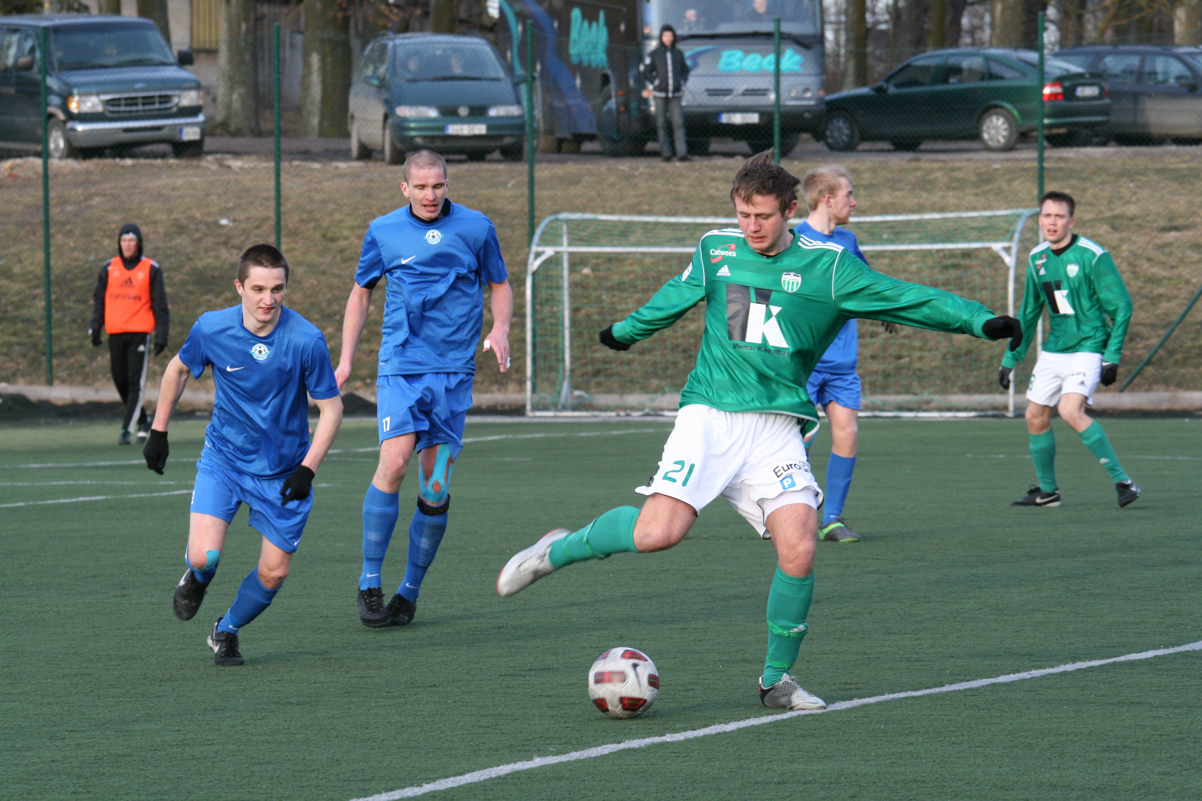 Tartu Tammeka (sinises) ja FC Levadia (rohelises).